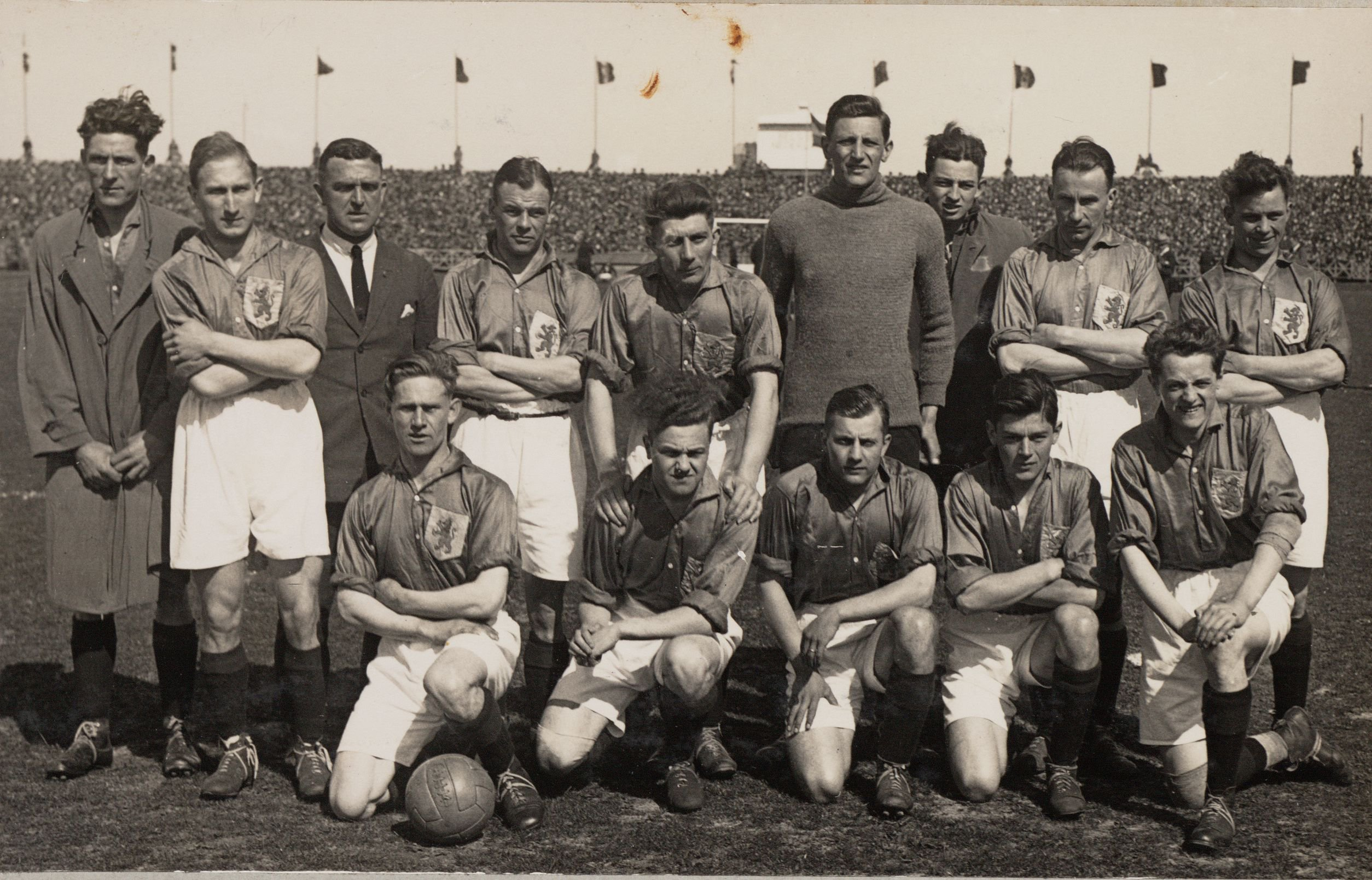 Het Nederlands elftal voor de interland tegen België (1 mei 1927). Staand, van links naar rechts: Reserve Peer Krom, Jan Elfring, oefenmeester Bob Glendenning, Rat Verlegh, Puck van Heel, Gejus van der Meulen, reserve Beb Bakhuys, Harry Dénis en Jaap Weber. Geknield: Pierre Massy, Dolf van Kol, Wim Tap, Felix Smeets en Leo Ghering. Nederland - België (3-2), gespeeld op 1 mei 1927 in het Stadion te Amsterdam. Opstelling: Gejus van der Meulen (HFC), Harry Dénis (HBS, aanvoerder), Dolf van Kol (Ajax), Rat Verlegh (NAC), Pierre Massy (Roermond), Puck van Heel (Feyenoord), Jan Elfring (Alcmaria Victrix), Felix Smeets (HBS), Wim Tap (ADO), Leo Ghering (LONGA) en Jaap Weber. Lokatie: Amsterdam